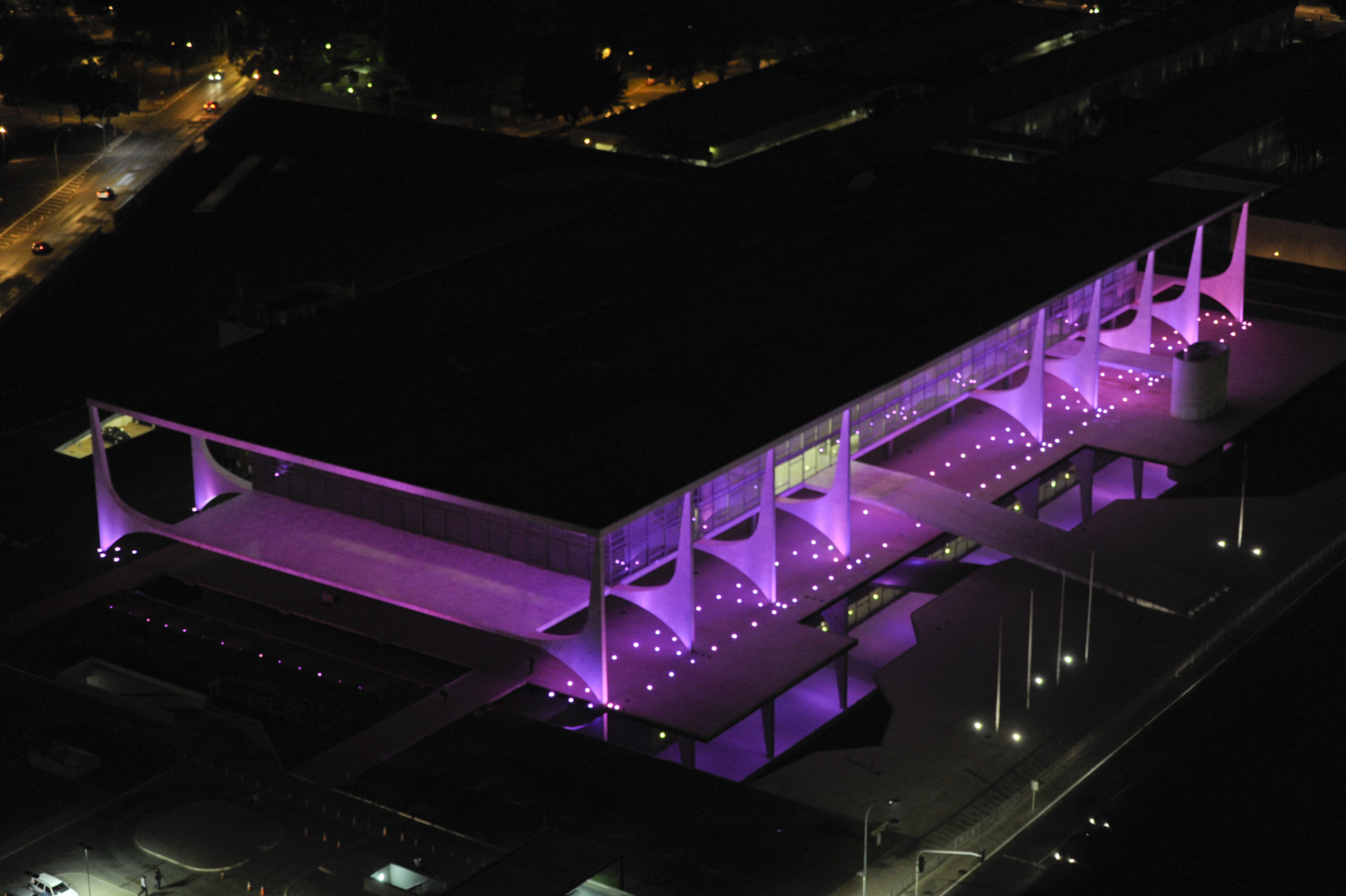 Iluminação cor-de-rosa para marcar o mês de conscientização sobre o câncer de mama, conhecido como Outubro Rosa. Recebem a iluminação especial edifícios da Esplanada dos Ministérios e da Praça dos Três Poderes, inclusive o prédio do Senado. Foto: Jefferson Rudy/Agência Senado